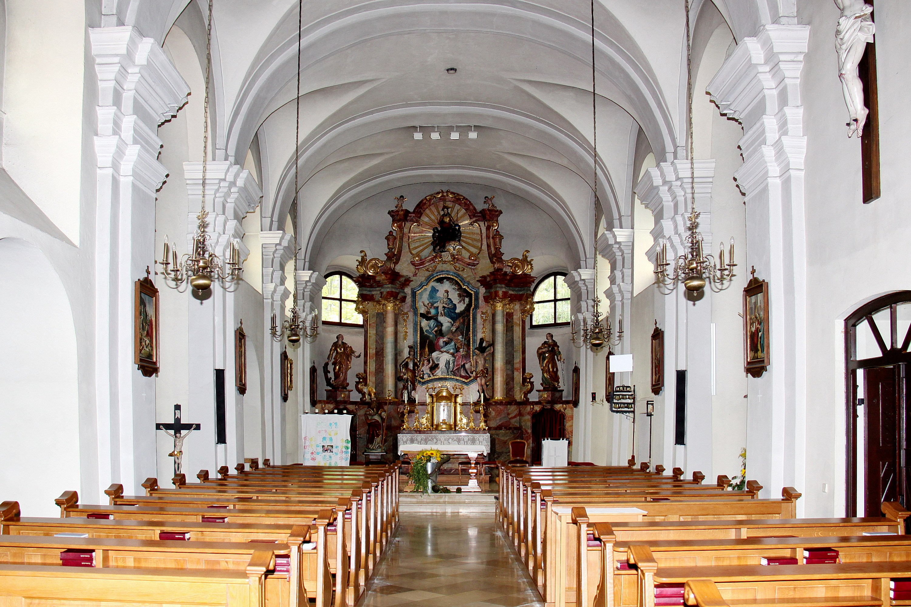 Denkmalgeschützte römisch-katholische Pfarrkirche in Pöttsching.